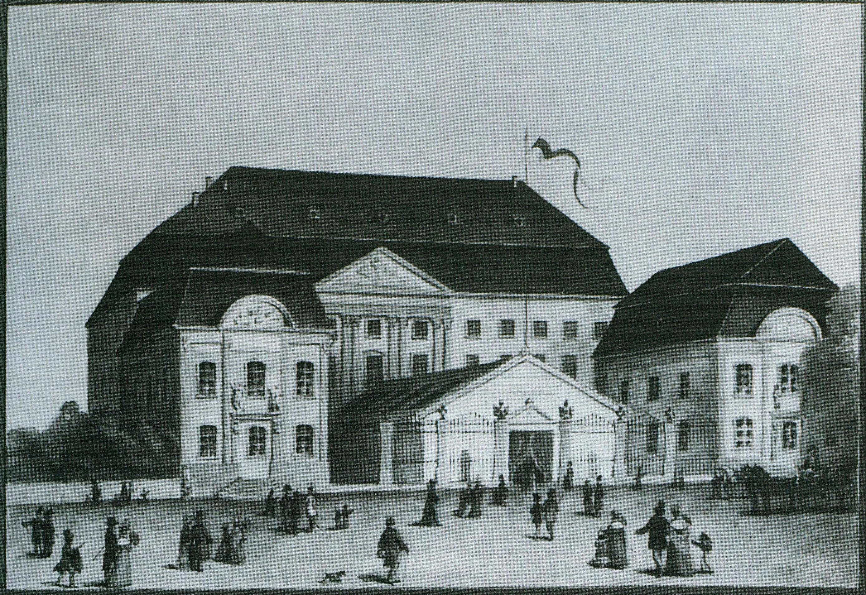 Das Mainzer Deutschhaus am Rhein während der ersten allgemeinen Industrieausstellung 1842. Im Hof ein Pavillon.